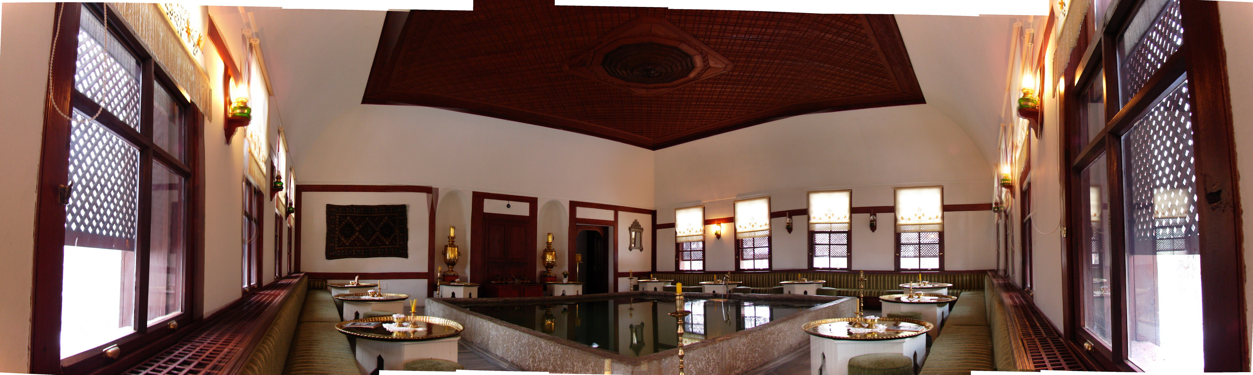 Safranbolu Asmazlar Konağı 41°14′55.7″N 32°41′33.7″E / 41.248806°N 32.692694°E